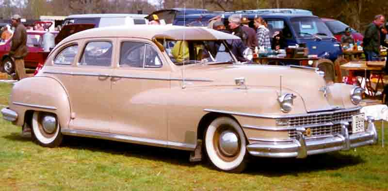 1946 Chrysler Series C-38 Windsor 4-Door Sedan